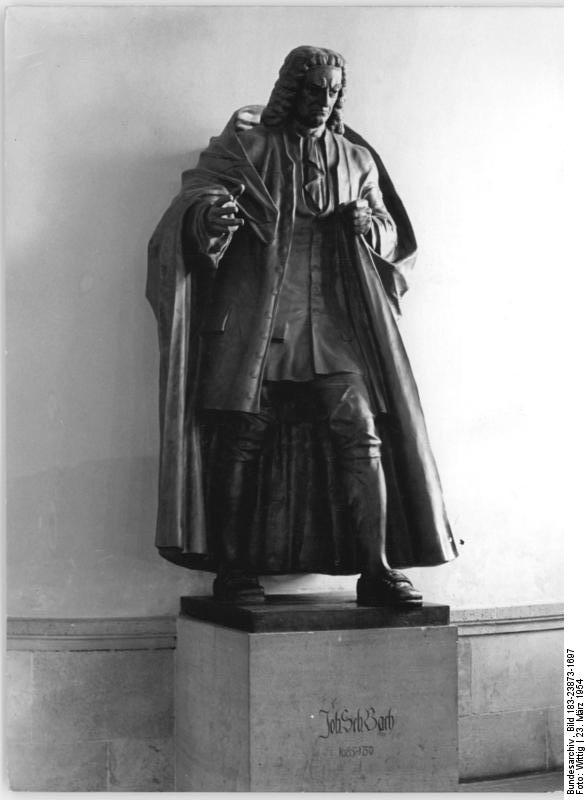 Eisenach, Bach-Denkmal Zentralbild TBD (Wittig) 23.3.1954 11 Motive Bachehrung 1954 in der Wartburgstadt Eisenach. Der 269. Geburtstag des grossen Meisters der deutschen Musik, Johann Sebastian Bach, wurde in seiner Geburtsstadt Eisenach feierlich begangen. An der diesjährigen Bachehrung in Eisenach nahmen zum ersten Mal nach 1950 wieder viele westdeutsche Gäste teil. Die Pflege des alten nationalen Kulturerbes, und hier besonders der Bach'schen Musik, kam in den Konzerten des Bach-Chores in der Georgenkirche, der Taufkirche von J.S.Bach, zum Ausdruck. Auch die "Arbeitsgemeinschaft für alte Musik" und der Madrigalchor sowie die Landeskapelle trugen zum Gelingen dieser festlichen Tage besonders bei. UBz: Denkmal von Johann Sebastian Bach am Eingang der Georgenkirche in Eisenach.